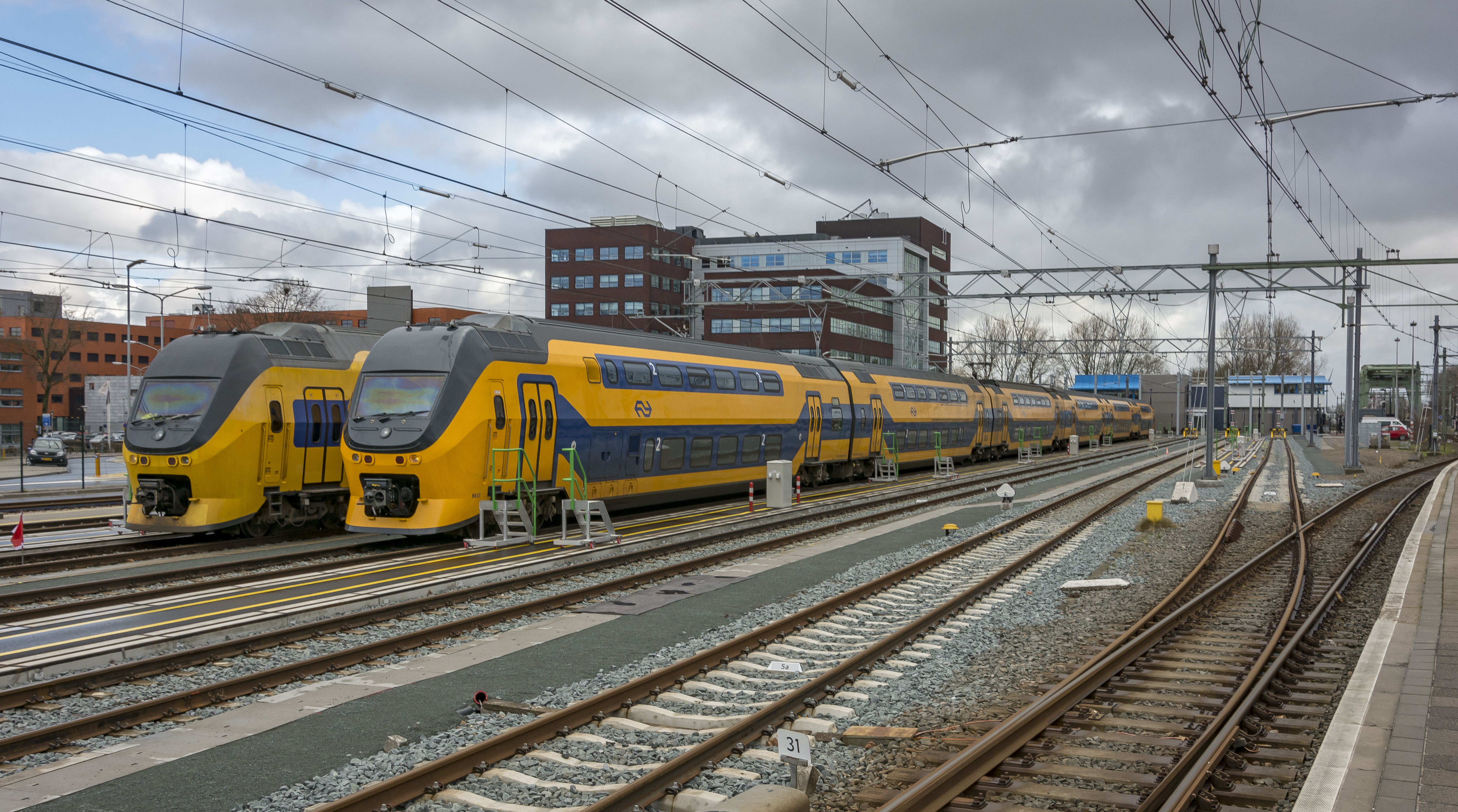 Nadat NSR VIRMm1 8637 in de nieuwe uitstraling twee weken heeft gependeld tussen Amsterdam Centraal en Enkhuizen, werd de trein op het opstelterrein van Alkmaar geplaatst, vanwege laagspanningsproblemen De trein werd later deze dag naar Onnen gereden.